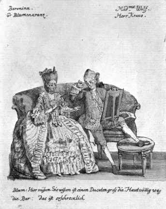 Maria Carolina Wolf roz. Benda ve hře "Der Postzug" , leden 1776, Liebhabertheater Výmar (rytina Georg Melchior Kraus)